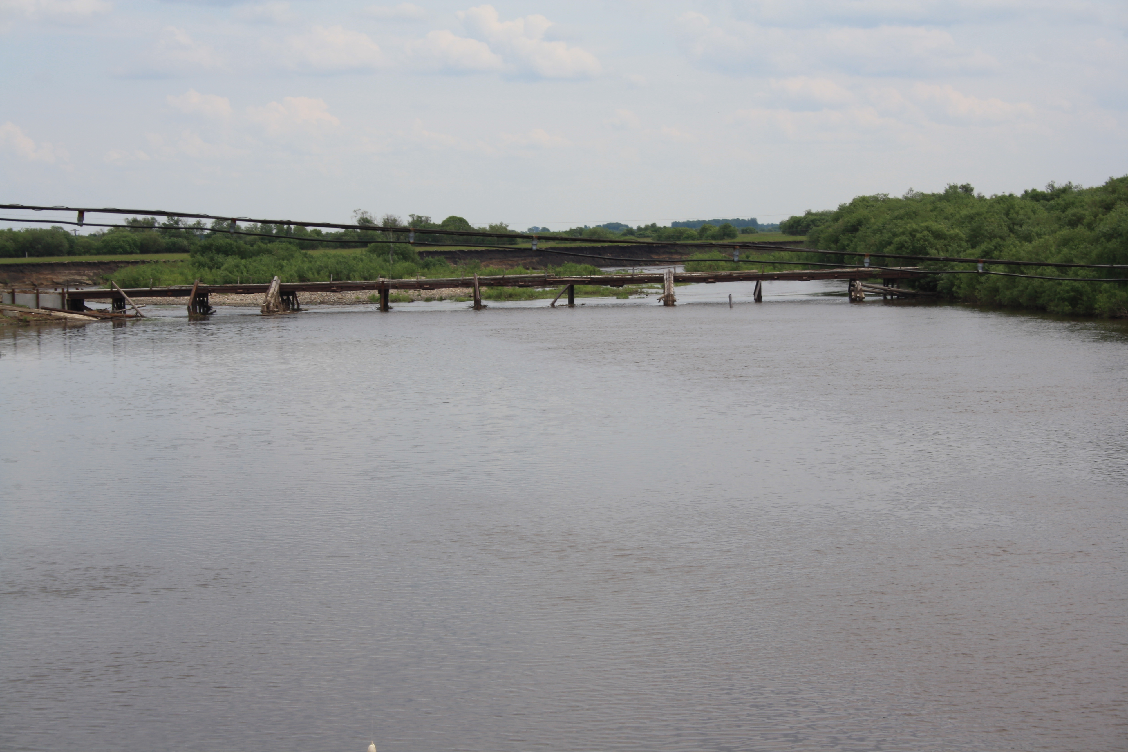 Река Ница, в районе села Ключи Свердловской области.